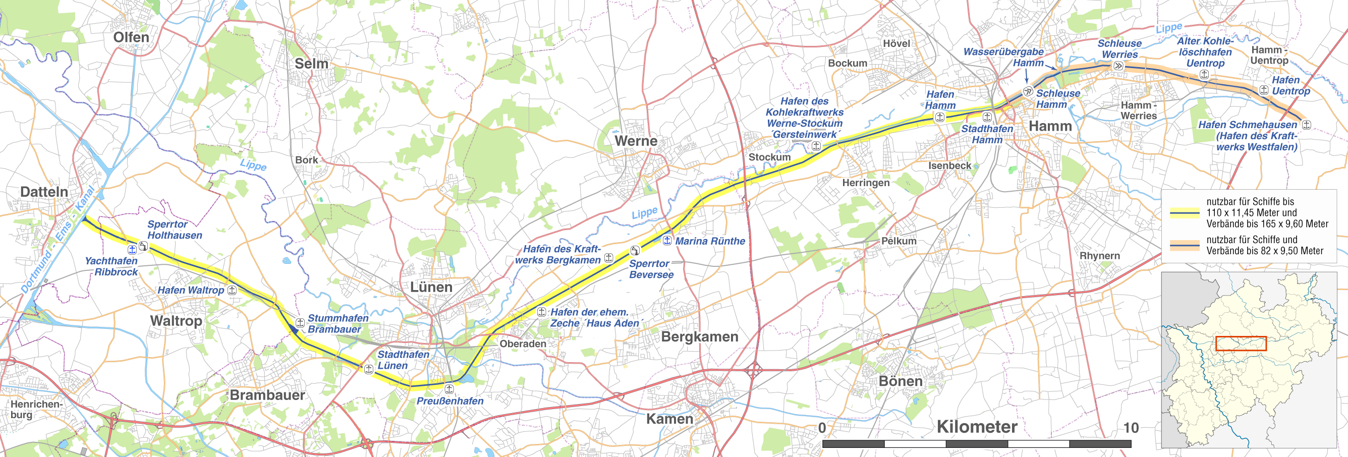 Karte des Datteln-Hamm-Kanals